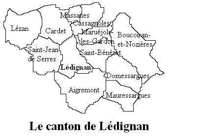 Le canton de Lédignan Image personnelle